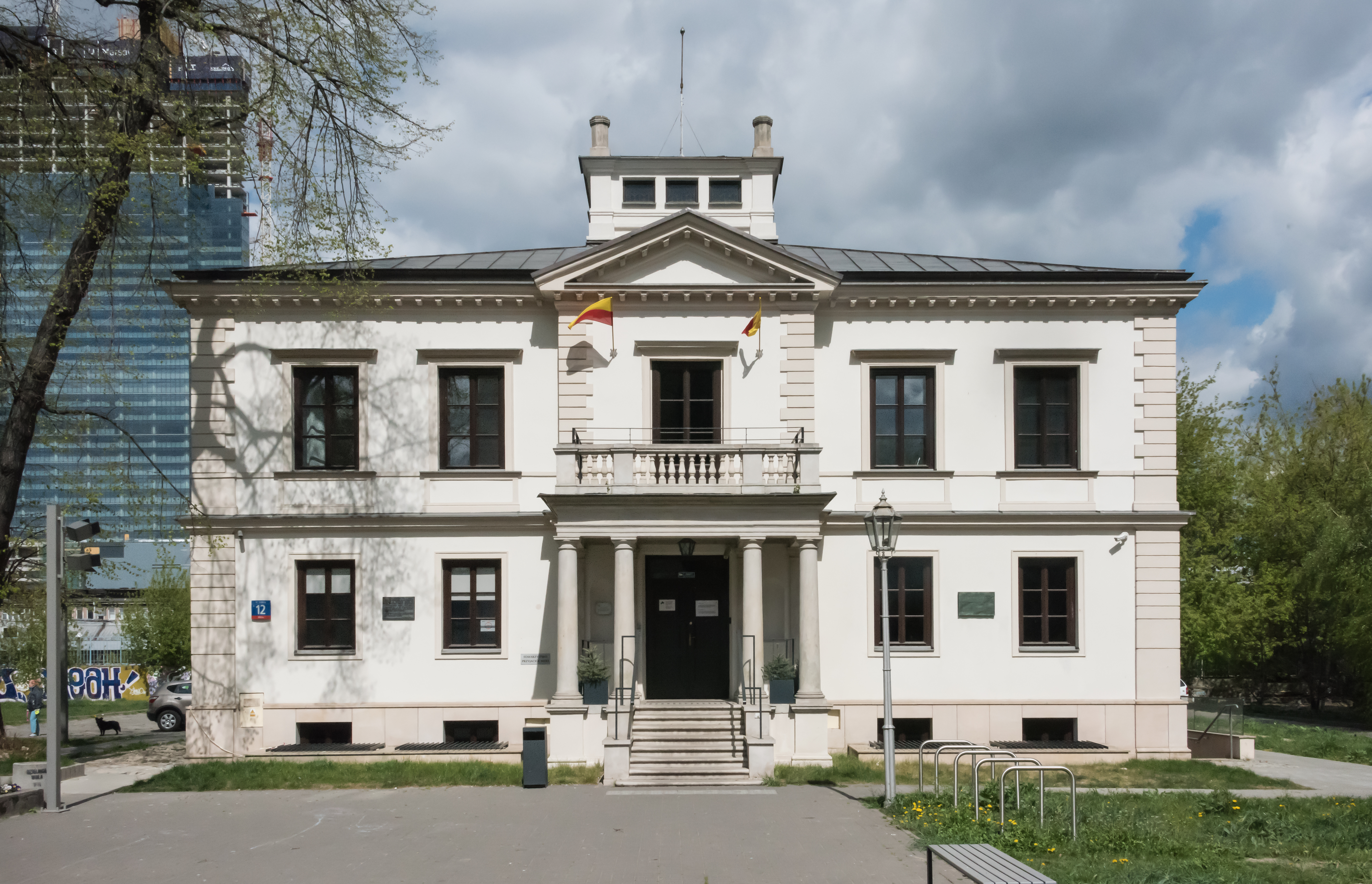 Pałacyk Bormana (Sikorskiego) przy ul. Srebrnej 12 w Warszawie